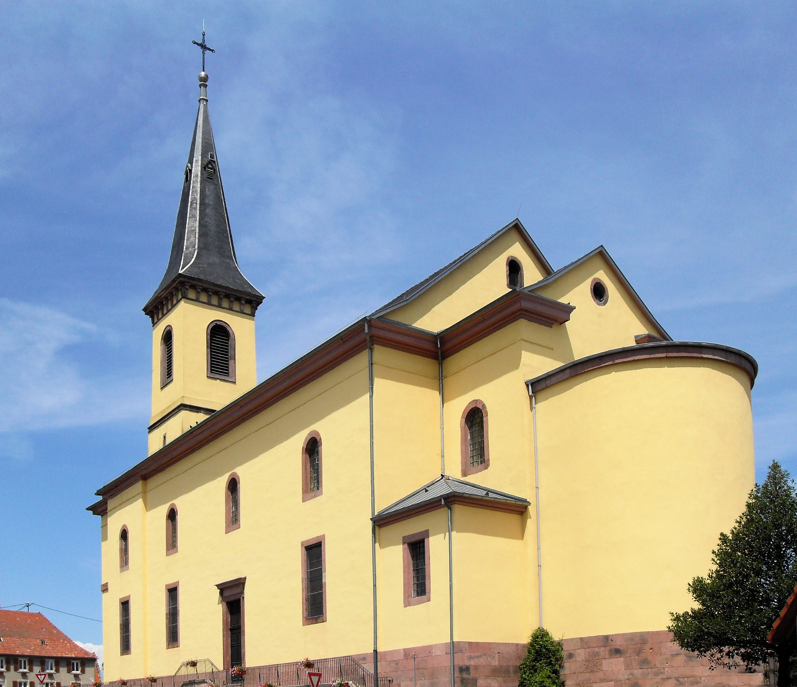 L'église Saint-Jacques-le-Majeur à Heiteren